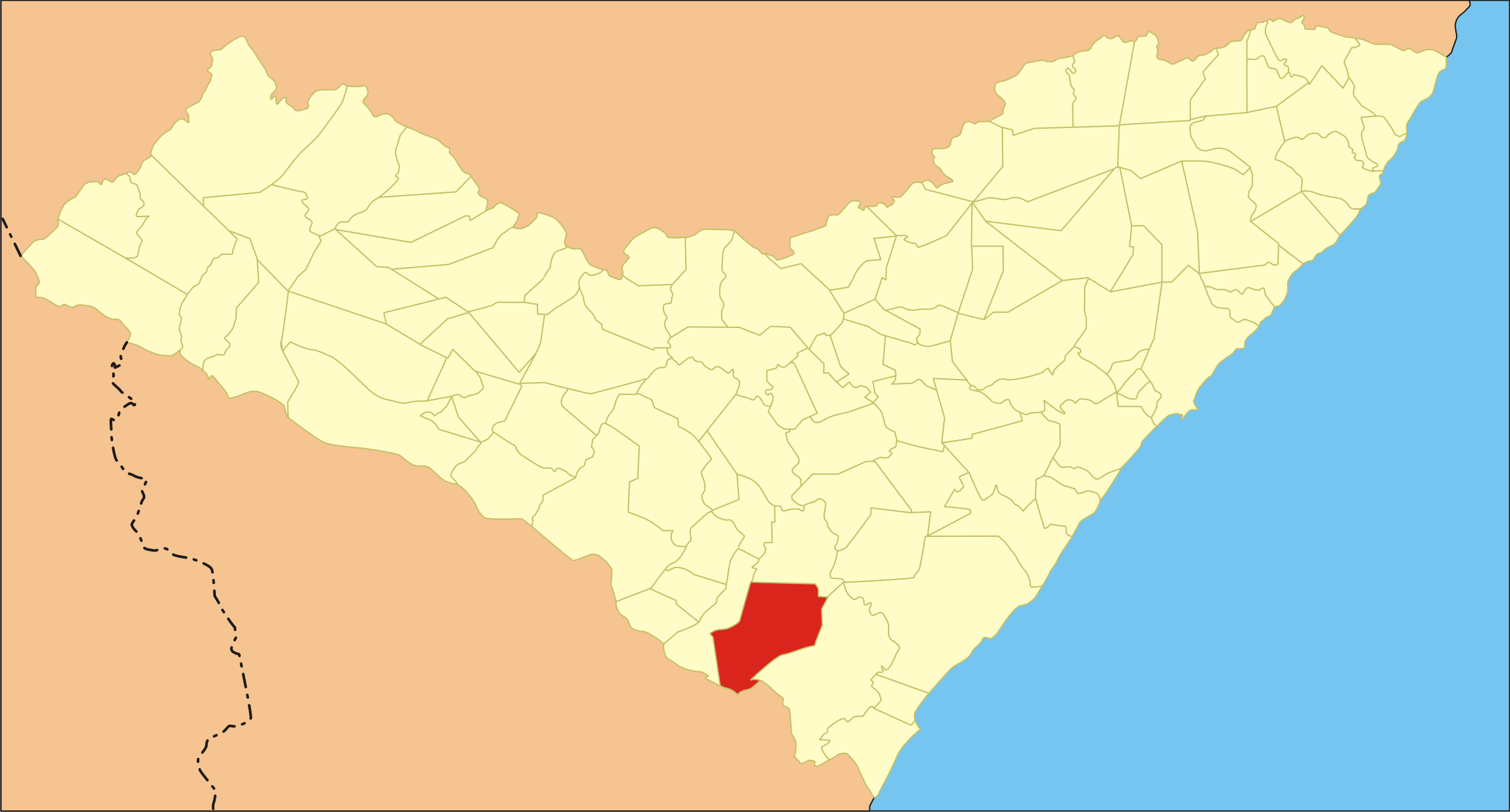 Localização da cidade em Alagoas